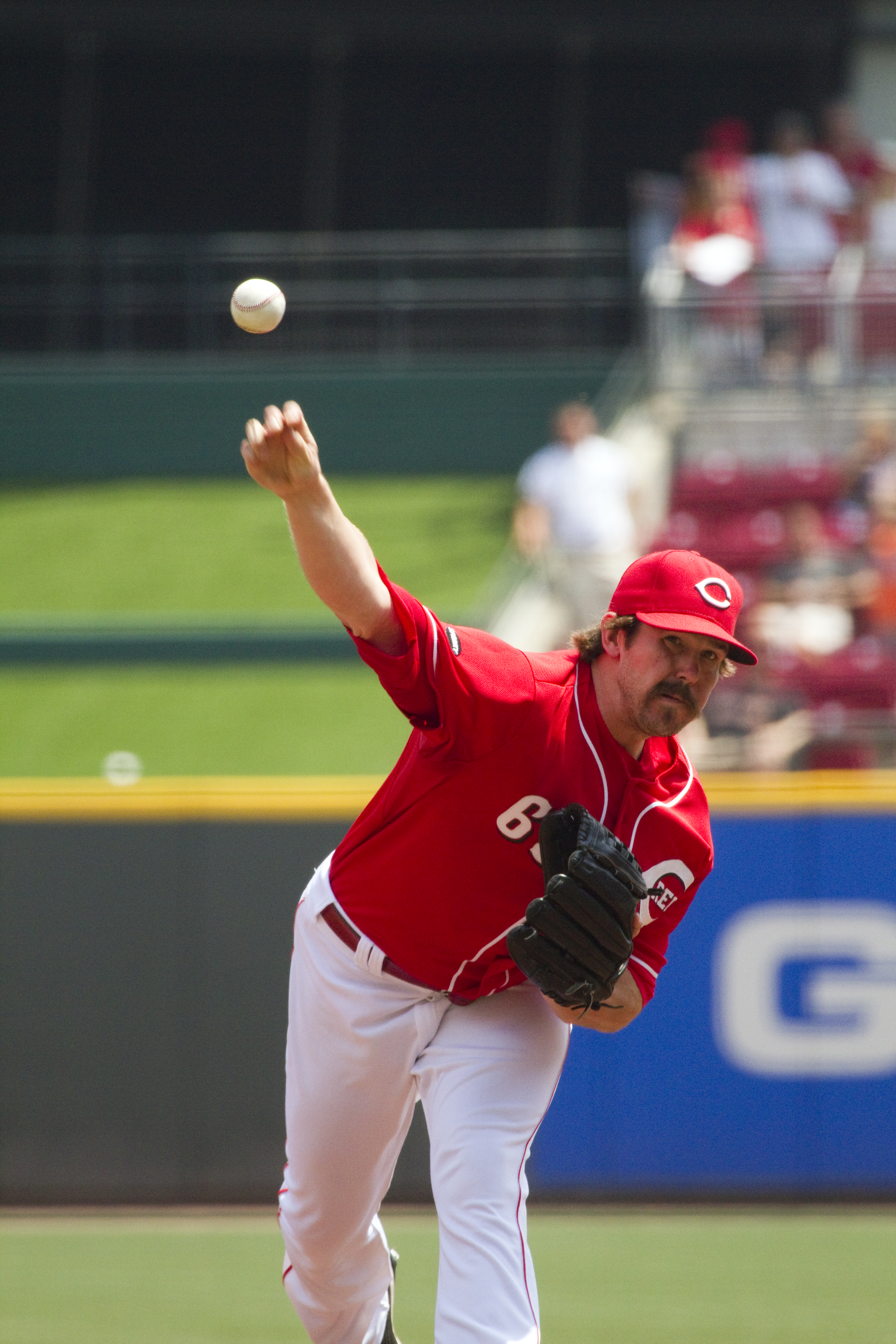 Sam LeCure